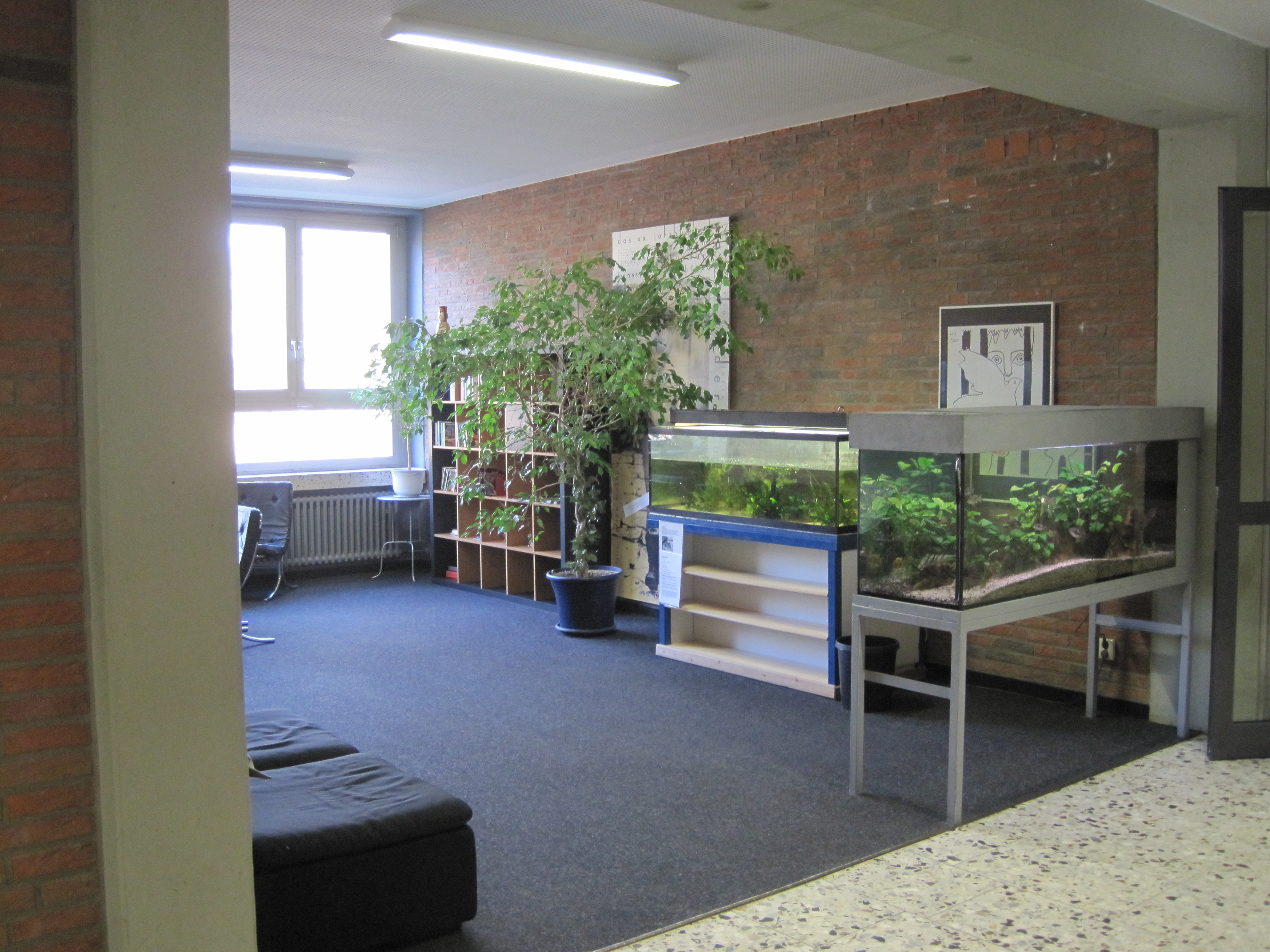 Das Foto zeigt den als Warteraum ausgestalteten Lichtflur im Verwaltungsbereich des Galilei-Gymnasiums Hamm.